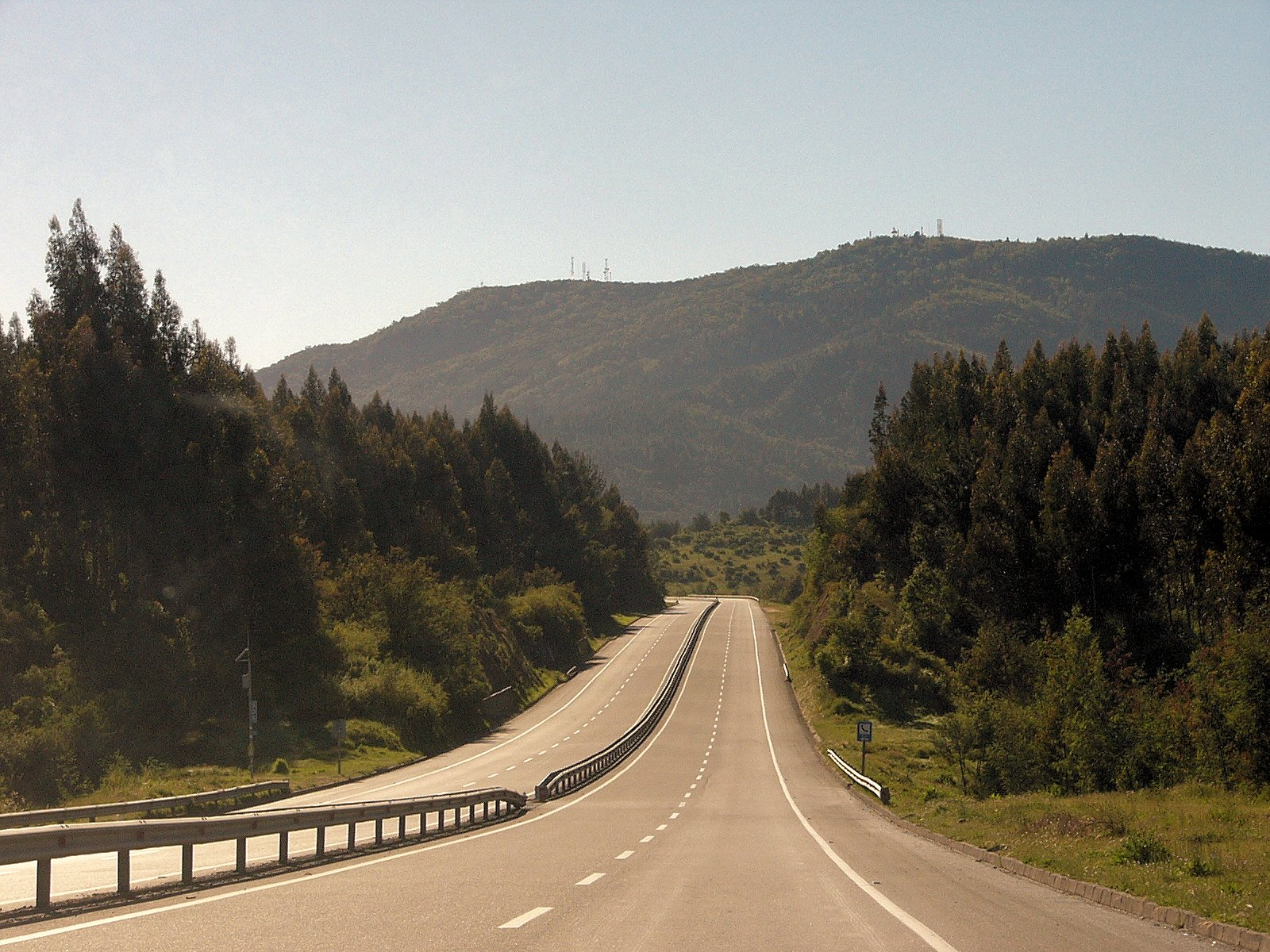 Tramo de la Autopista del Itata, ruta CH-152, en la VIII Región del Biobio, Chile